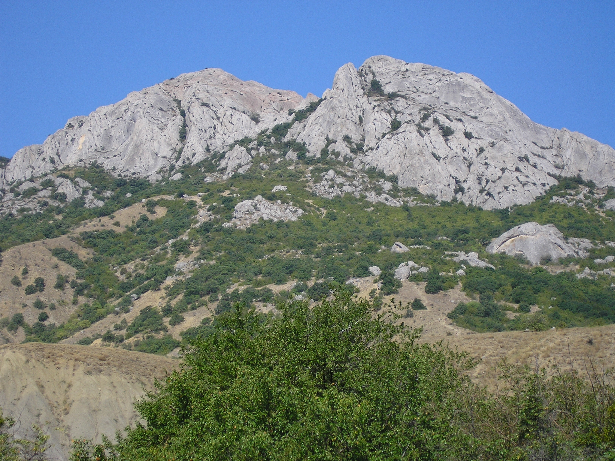 Эчки-Даг